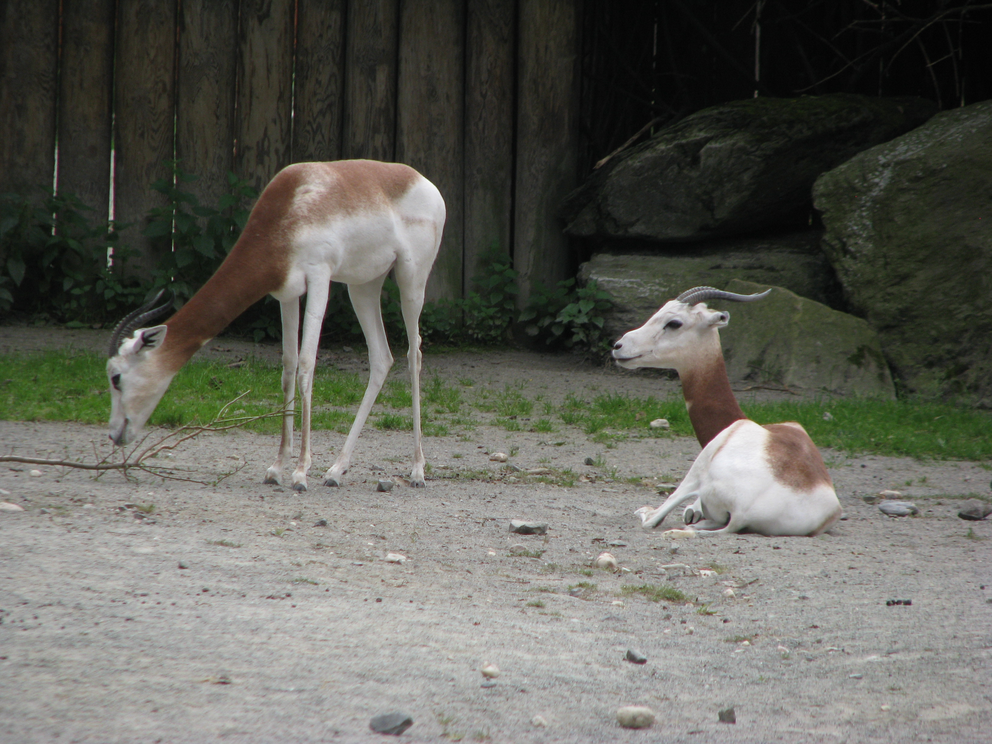 gazela dama červenokrká (Nanger dama ruficollis v zoo Dvůr Králové nad Labem